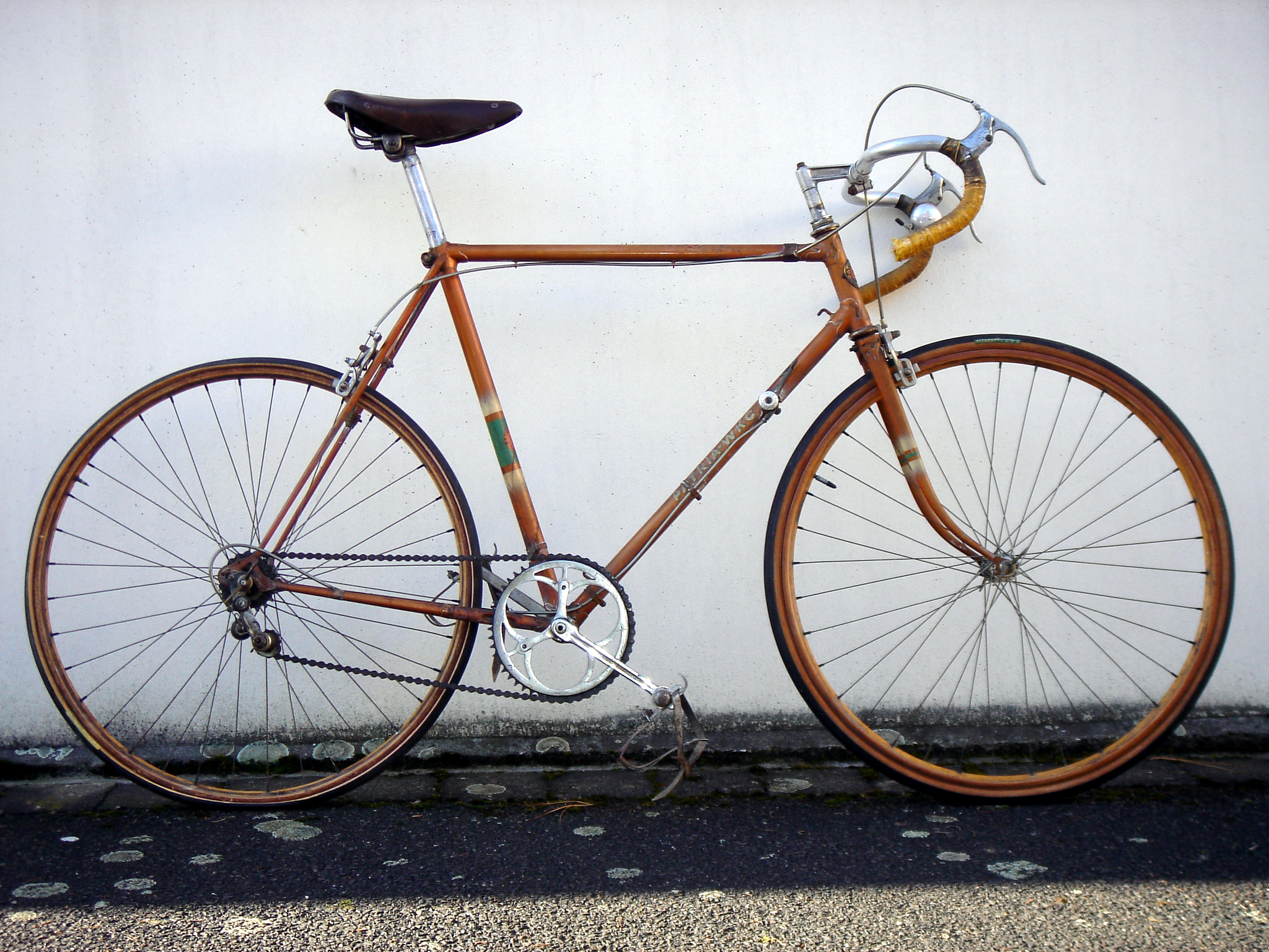 Herrenrennrad der Marke Patria WKC aus dem Jahre 1949, mit Fünffach-Schaltung und Holzfelgen